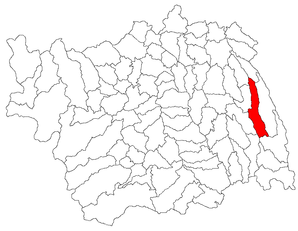 Categorie:Hărţi ale judeţului Bacău